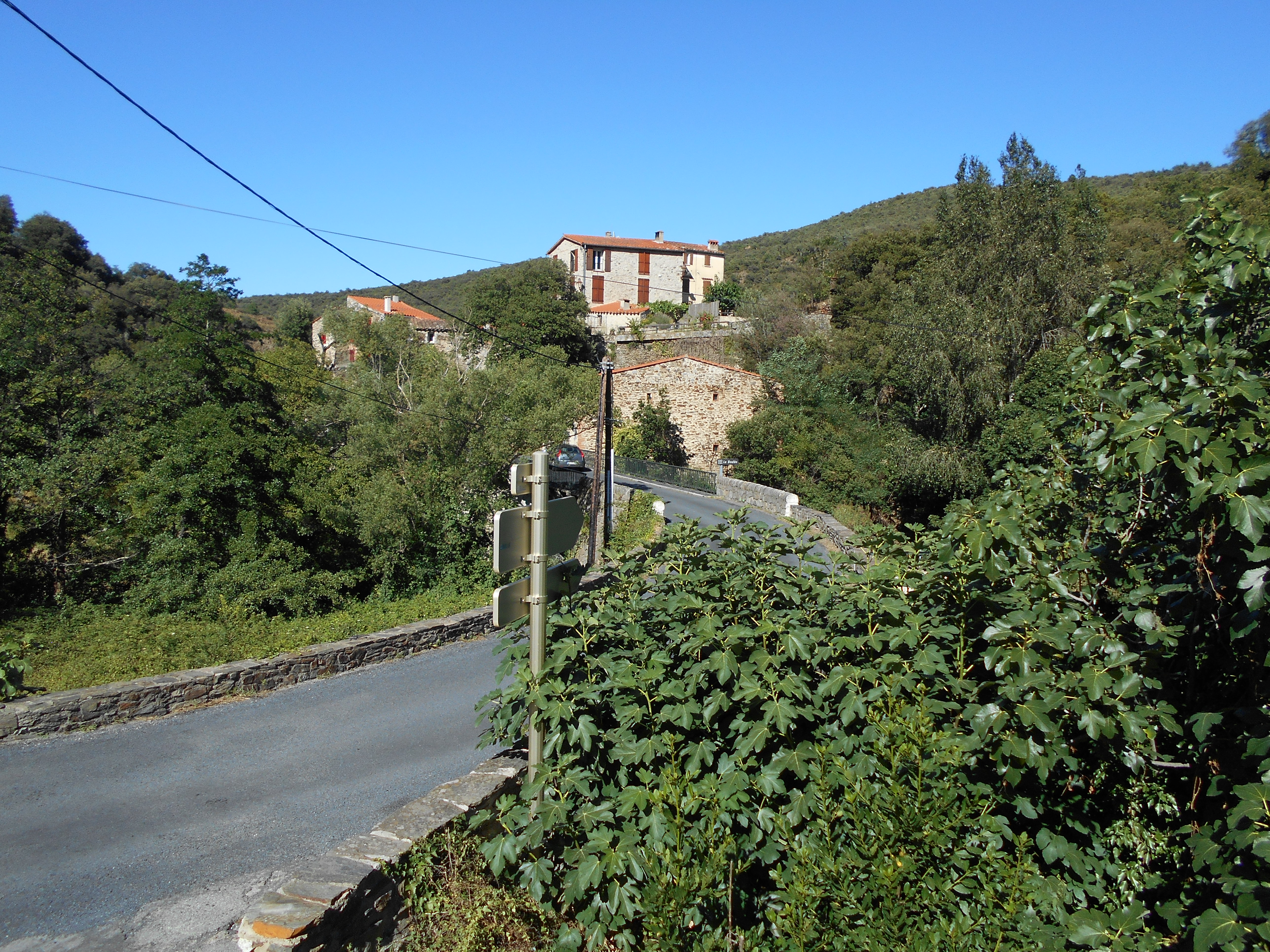 El Serrat